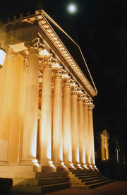 Zappion konferenciaközpont Athénban Theofil Hansen tervei alapján, 1870